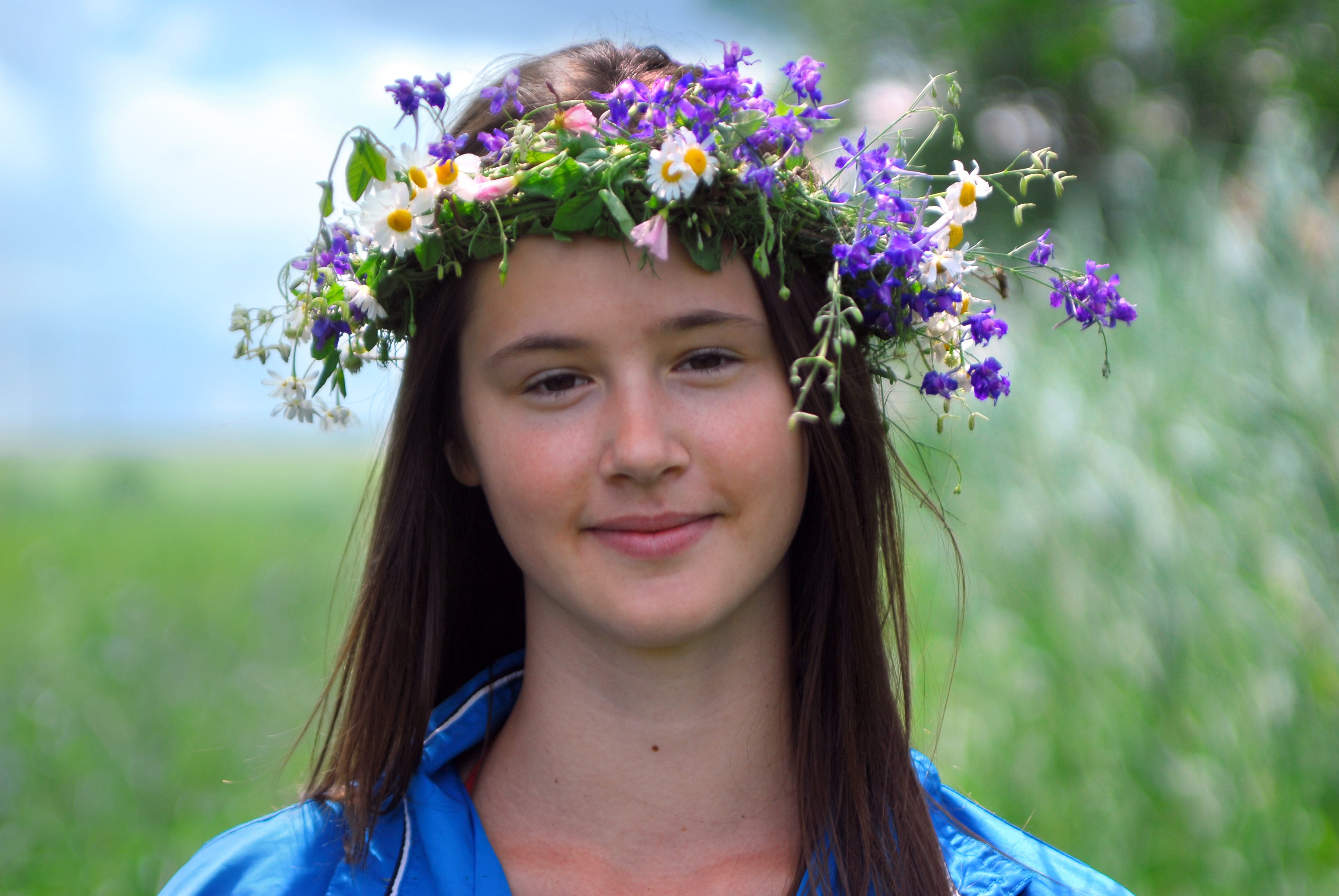 Девушка с венком. Родовое экопоселение «Кореньские родники». Белгородская область, июнь 2006 г.